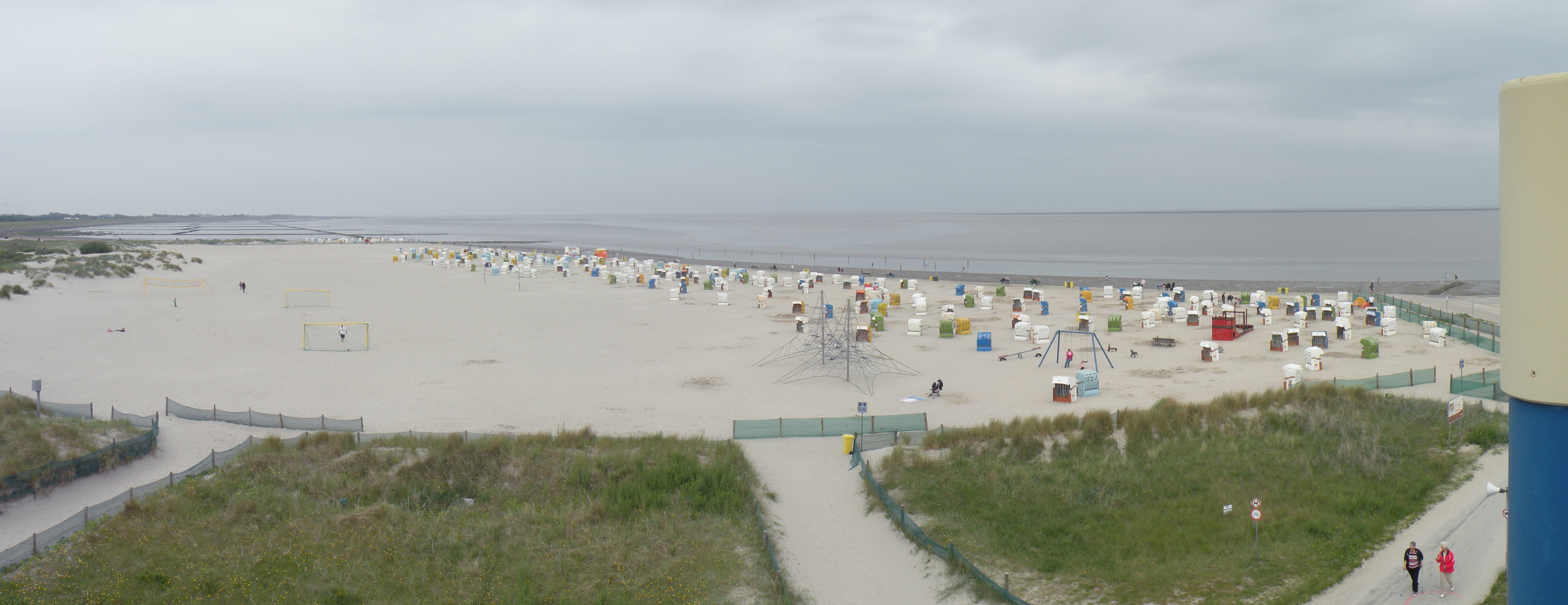 Norddeich.Beach..(Ostfriesland)